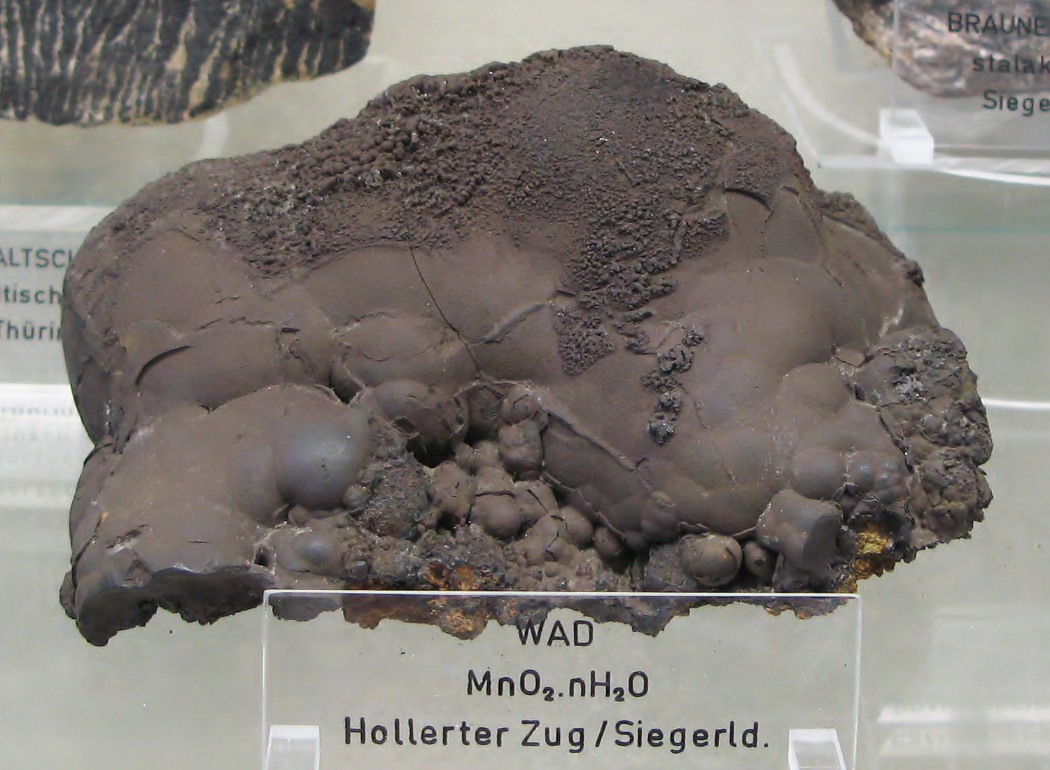 Wad, pulvriges Gemenge weicher Manganoxide (meist Pyrolusit) - Fundort: Hollerter Zug, Siegerland, Deutschland - Ausgestellt im Mineralogischen Museum Bonn